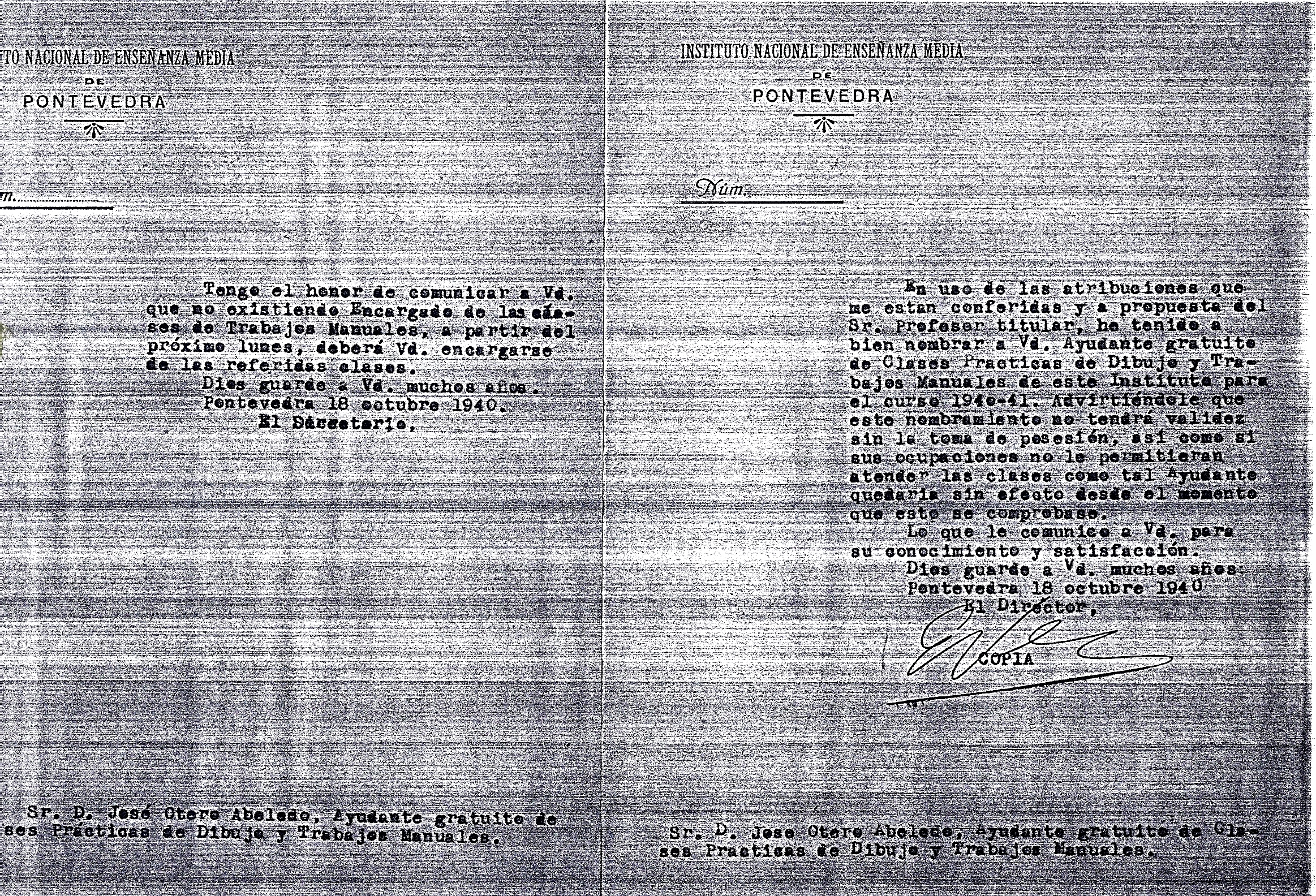 José Otero Abeledo: Axudante gratuíto de clases prácticas de Debuxo e Traballos Manuais no Instituo de Pontevedra